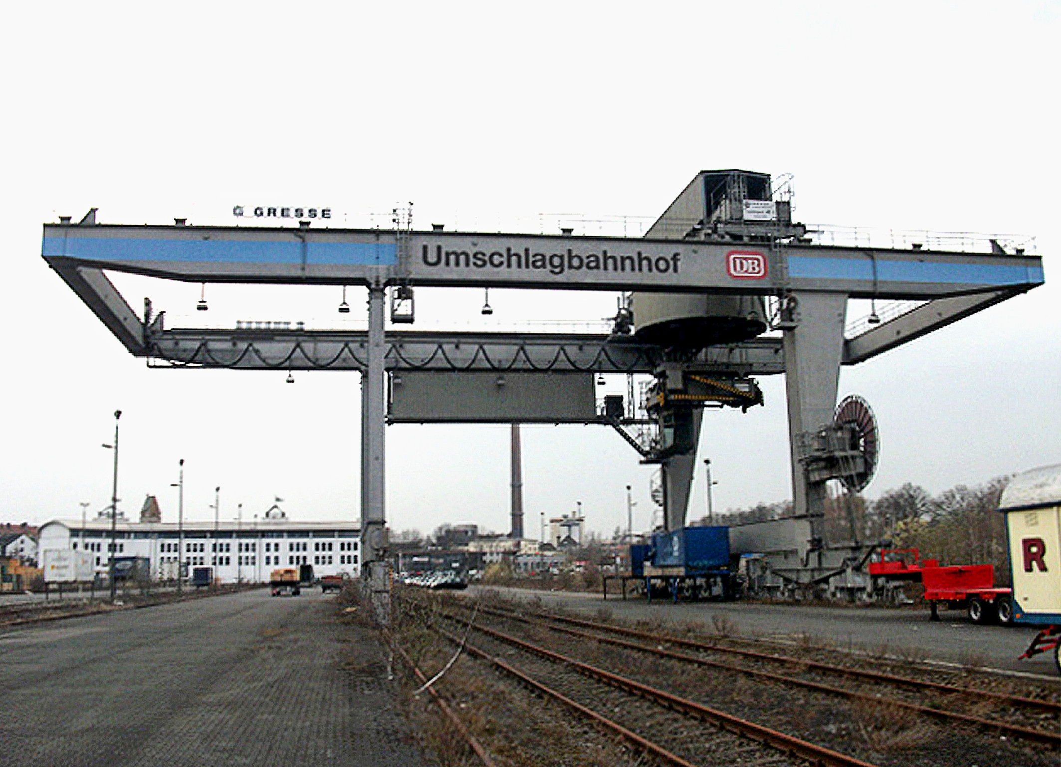 Der große Container-Kran steht in Bielefeld Ost seit längerem still.